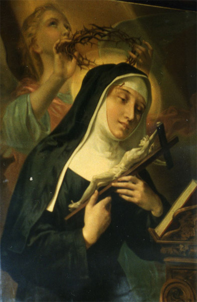 Неизвестный автор. Портрет Риты из Кашии (XIX век)